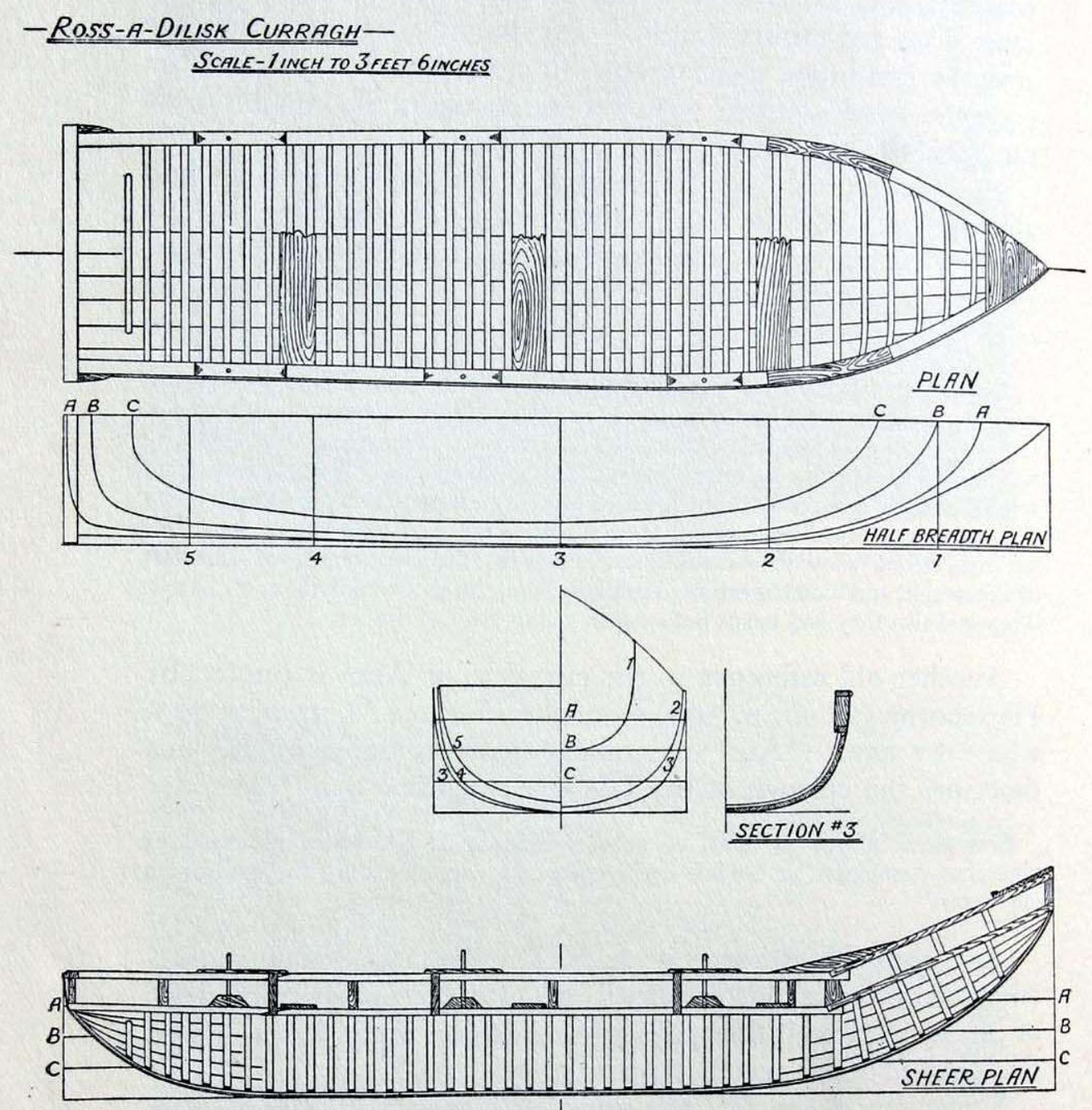 Теоретический чертёж курраха области Коннемара